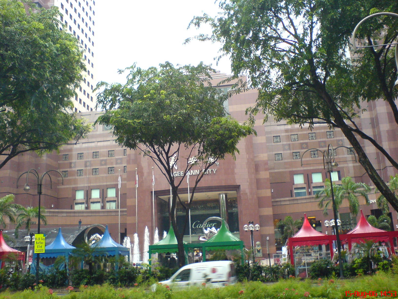 Taget fra modsatte side af Orchard Road